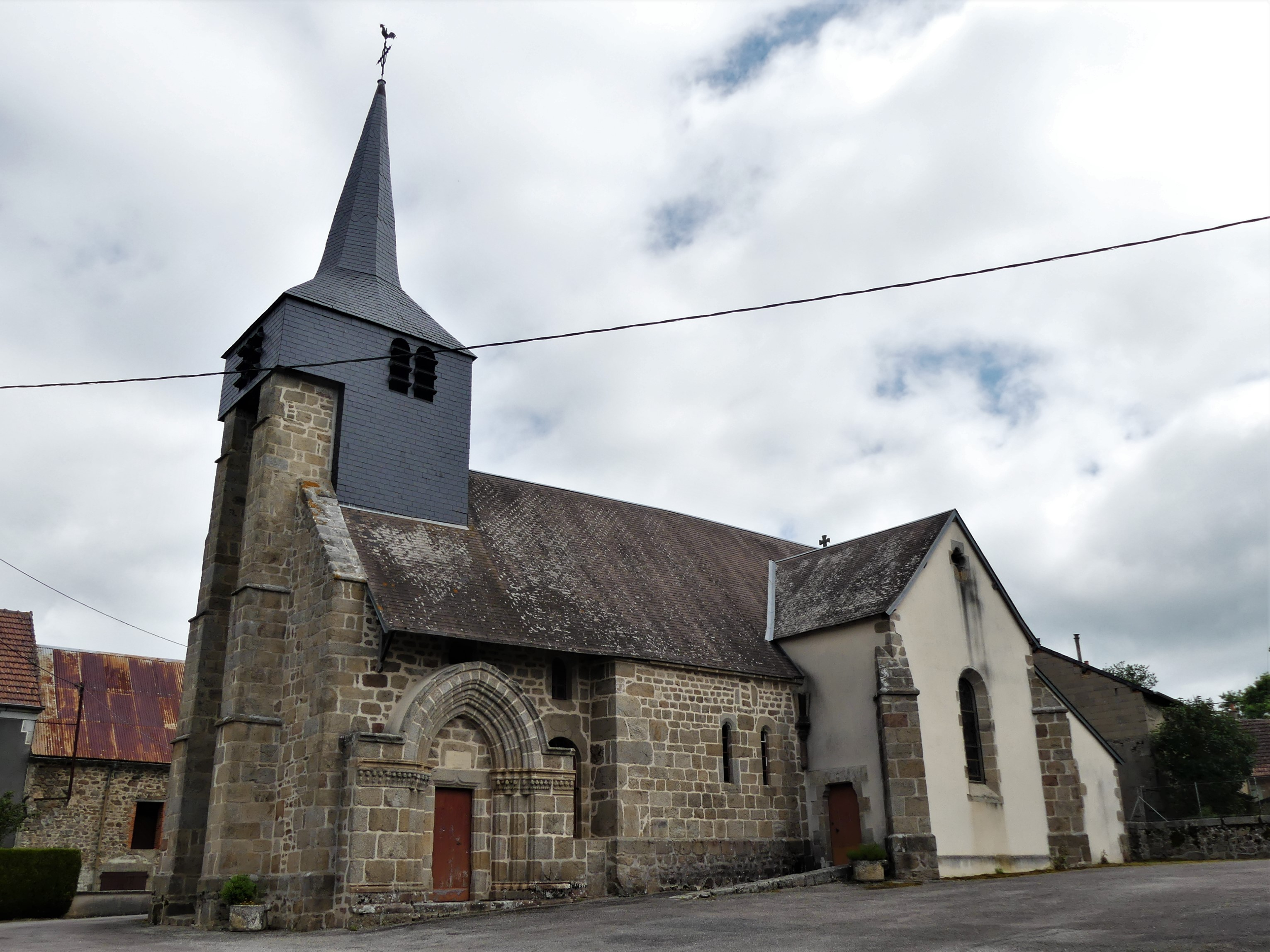 L'église de Saint-Priest, Creuse, France.